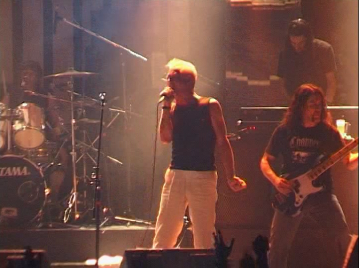 Javier Retamozocon Graham Bonnet